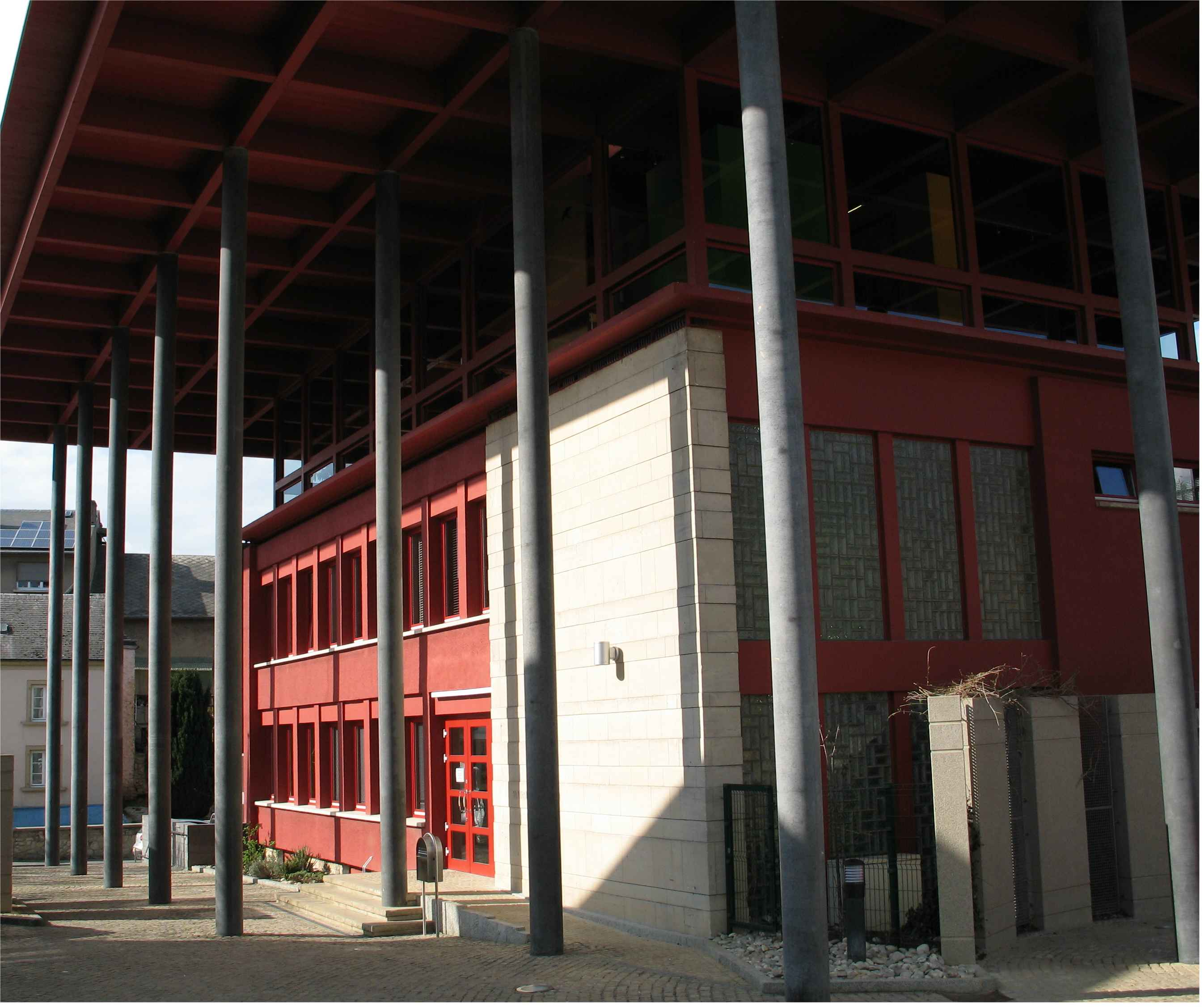 La maison communale de Dalheim (Luxembourg)